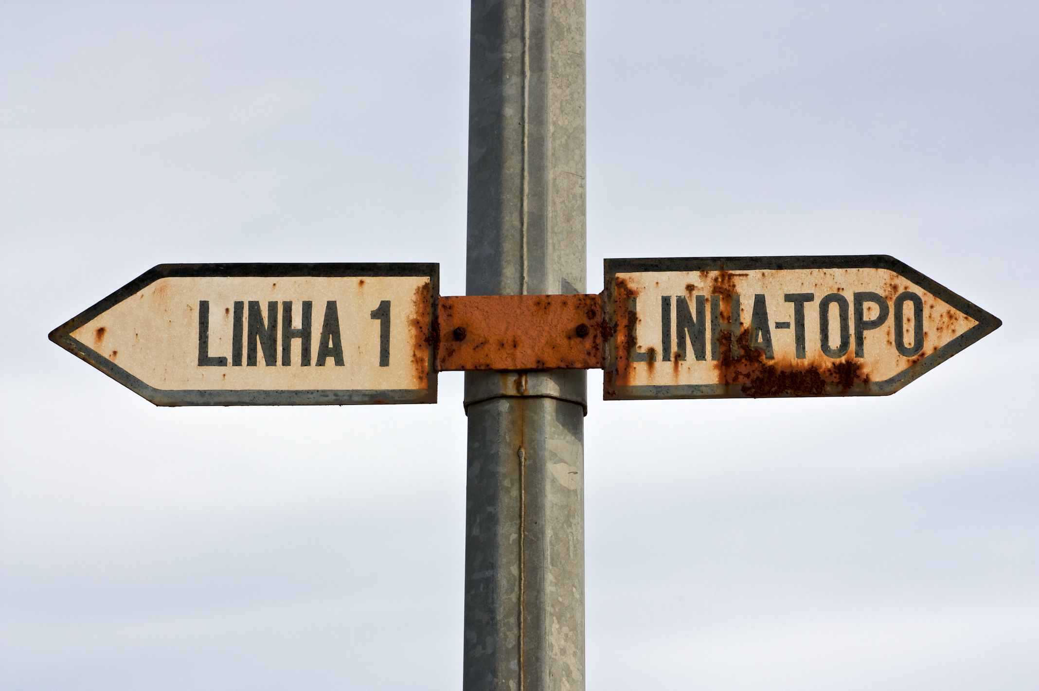 pormenor de placas. Tipo: ES Estação Satélite Local: Vendas Novas [Linha do Alentejo, PK 56] Data e hora: 11 de Novembro de 2009 [16h38]